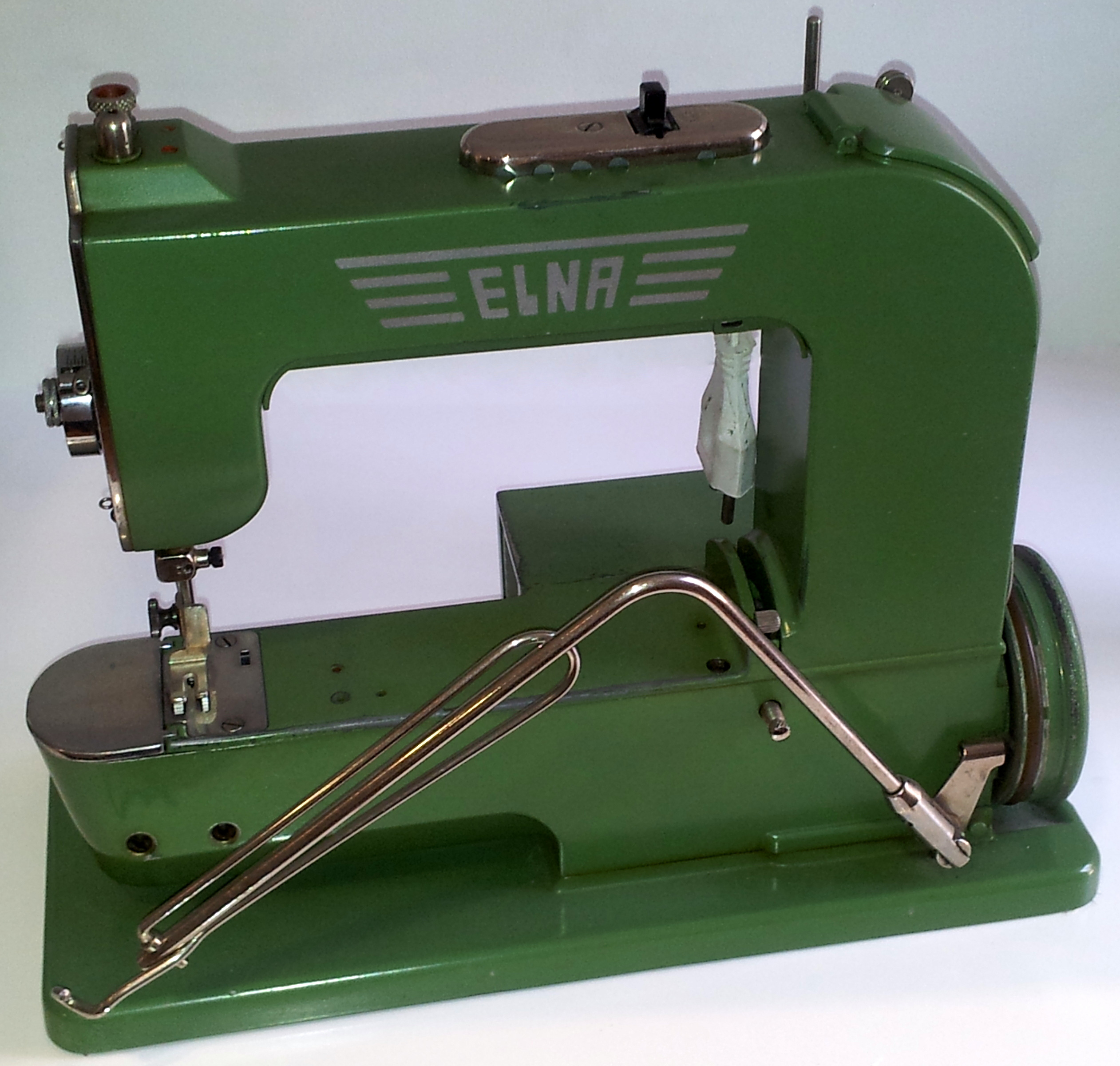 Première machine à coudre de marque Elna.